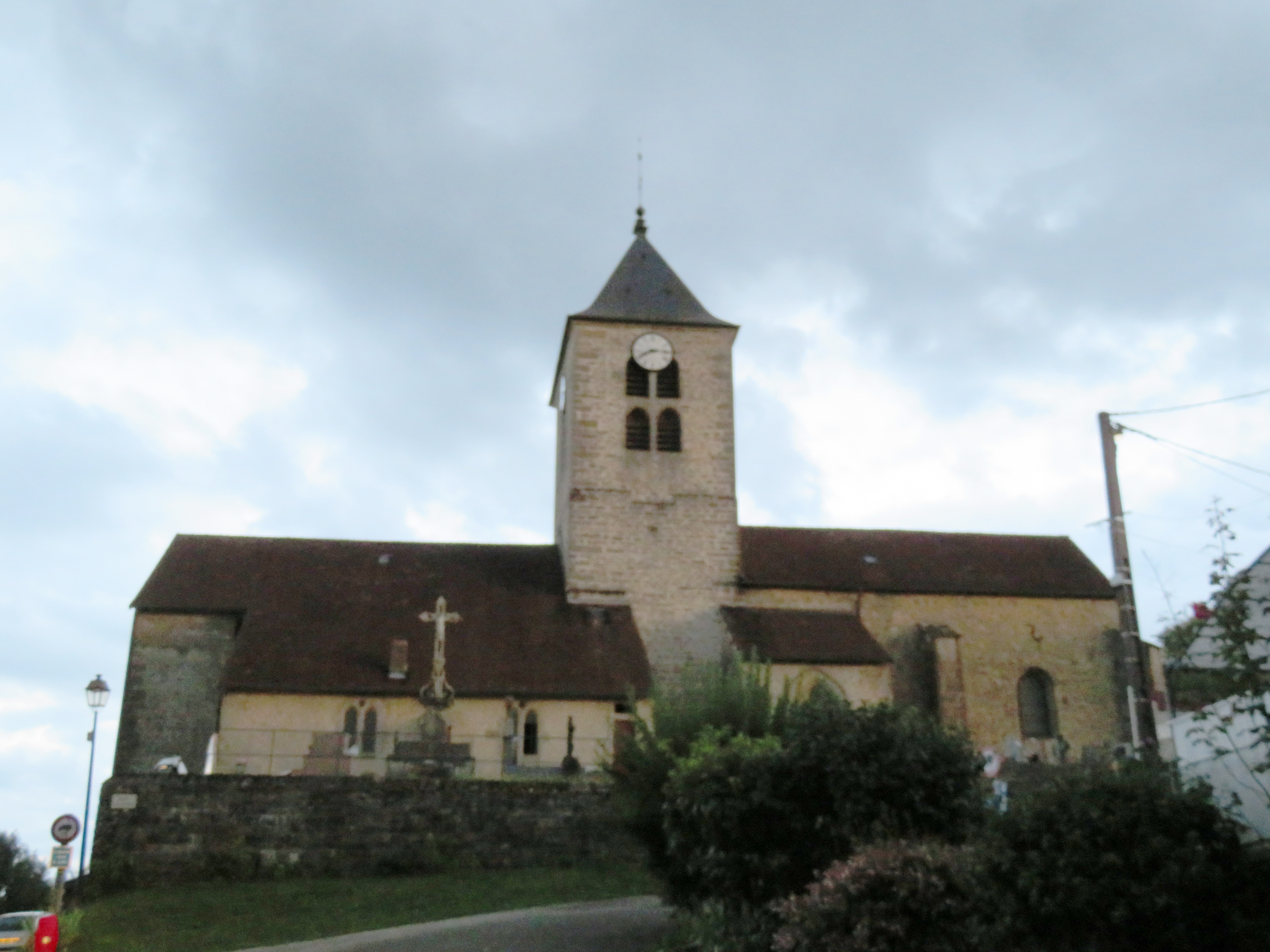 Saint-Laurent-la-Roche, église Saint-Laurent de Saint-Laurent-la-Roche. .